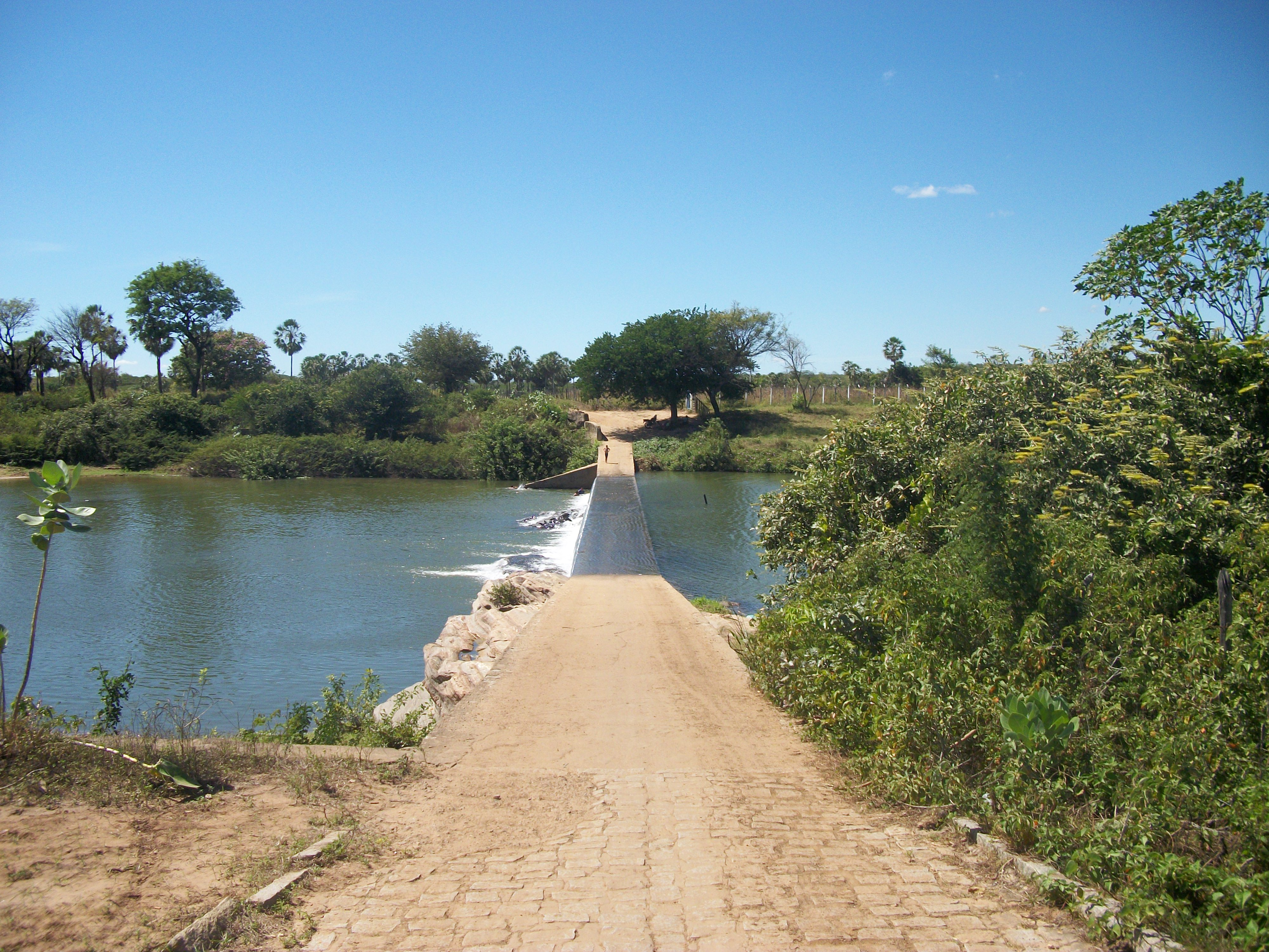 Rio Salgado, afluente do Rio Jaguaribe, Ceará